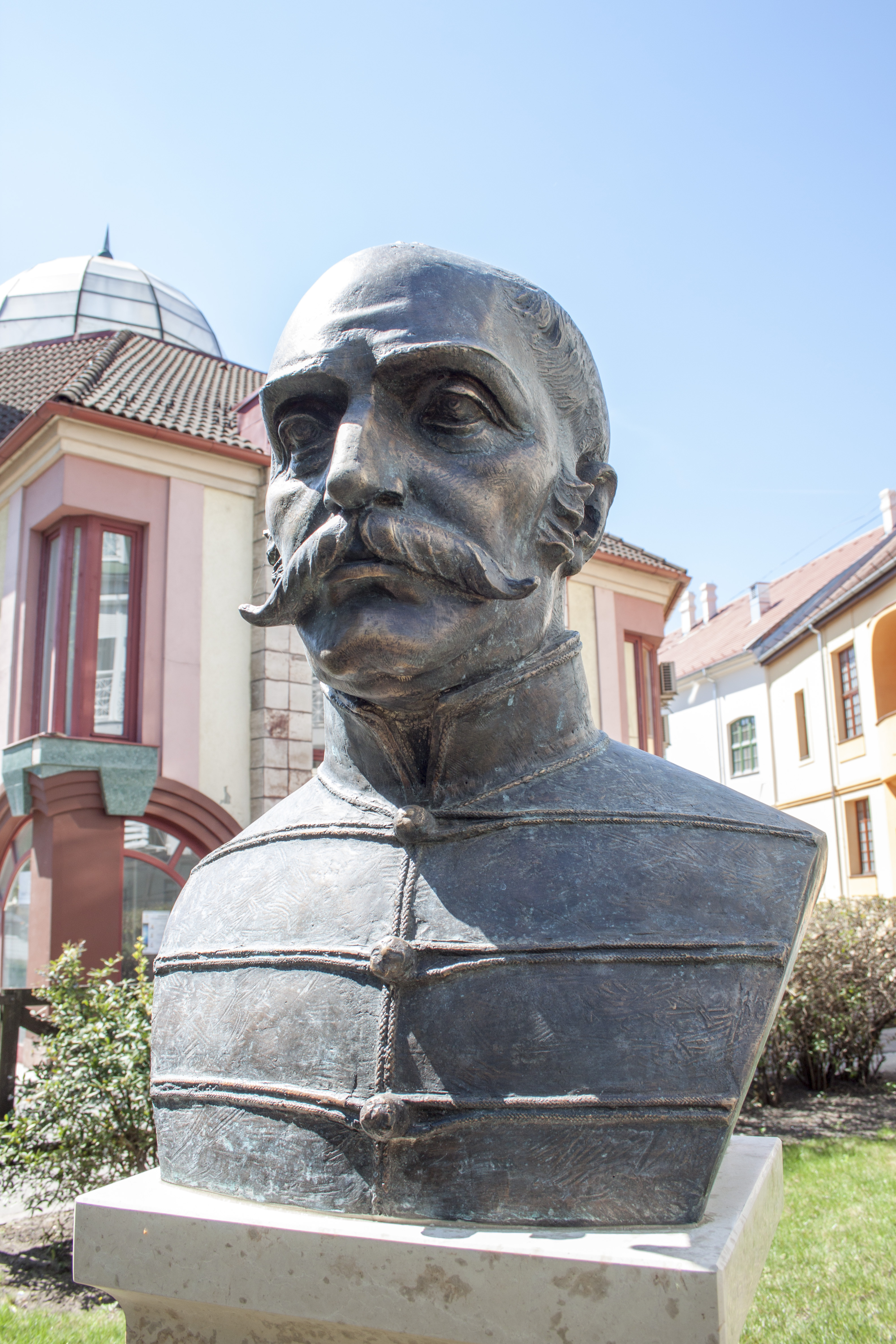 Mészáros Lázár mellszobra Baján. Harmath István alkotása (2015)